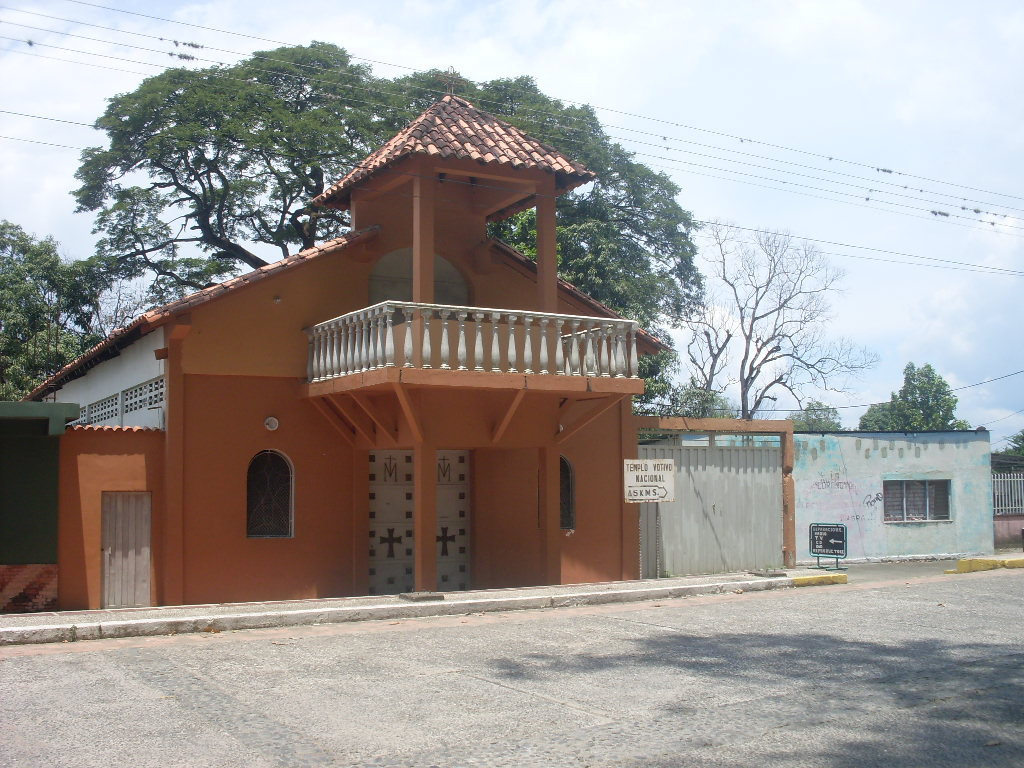 Guanare en el estado Portuguesa - Venezuela (2010)